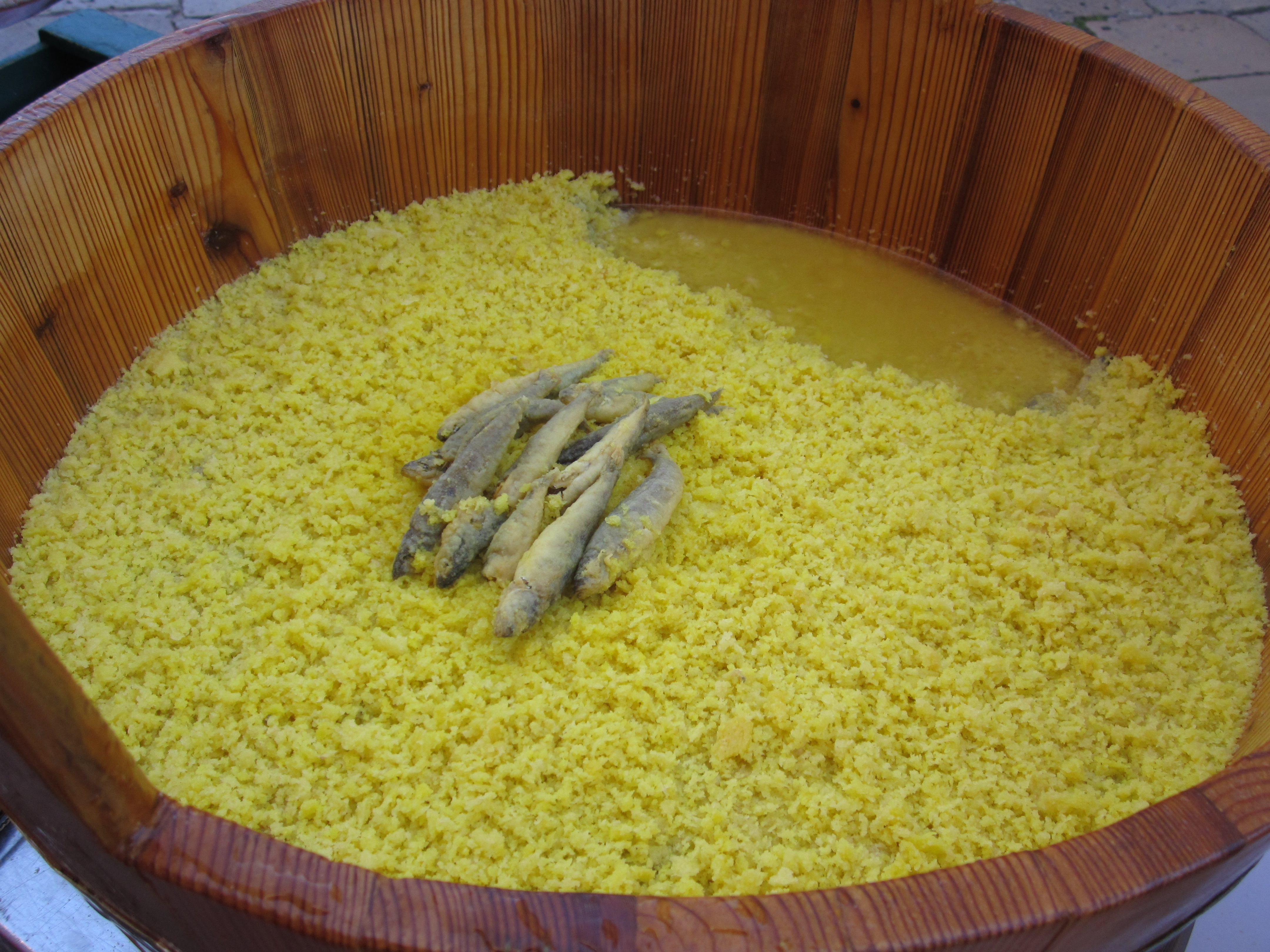 Scapece Gallipolina piatto tipico tradizionale.